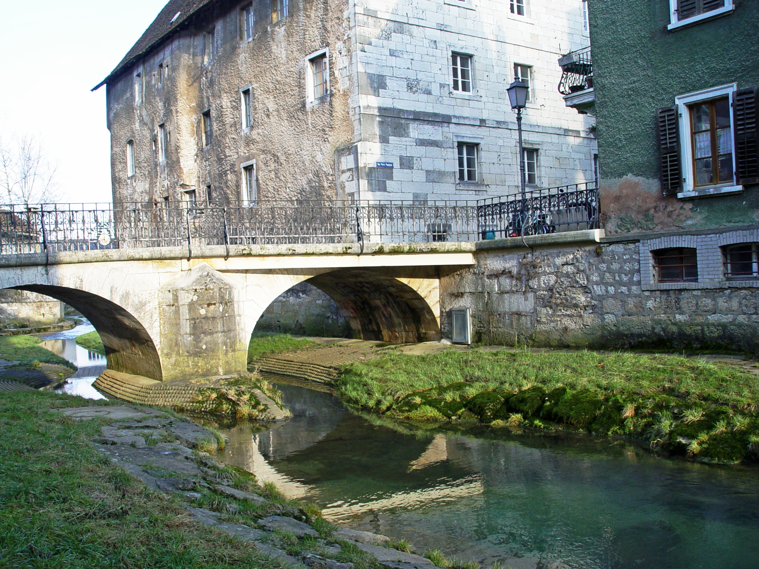 Bach La Creugenat, kanalisierter Nebenfluss von Allaine, welcher in Porrentruy in die Allaine einmündet